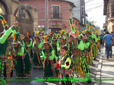 Bailando Tinkus